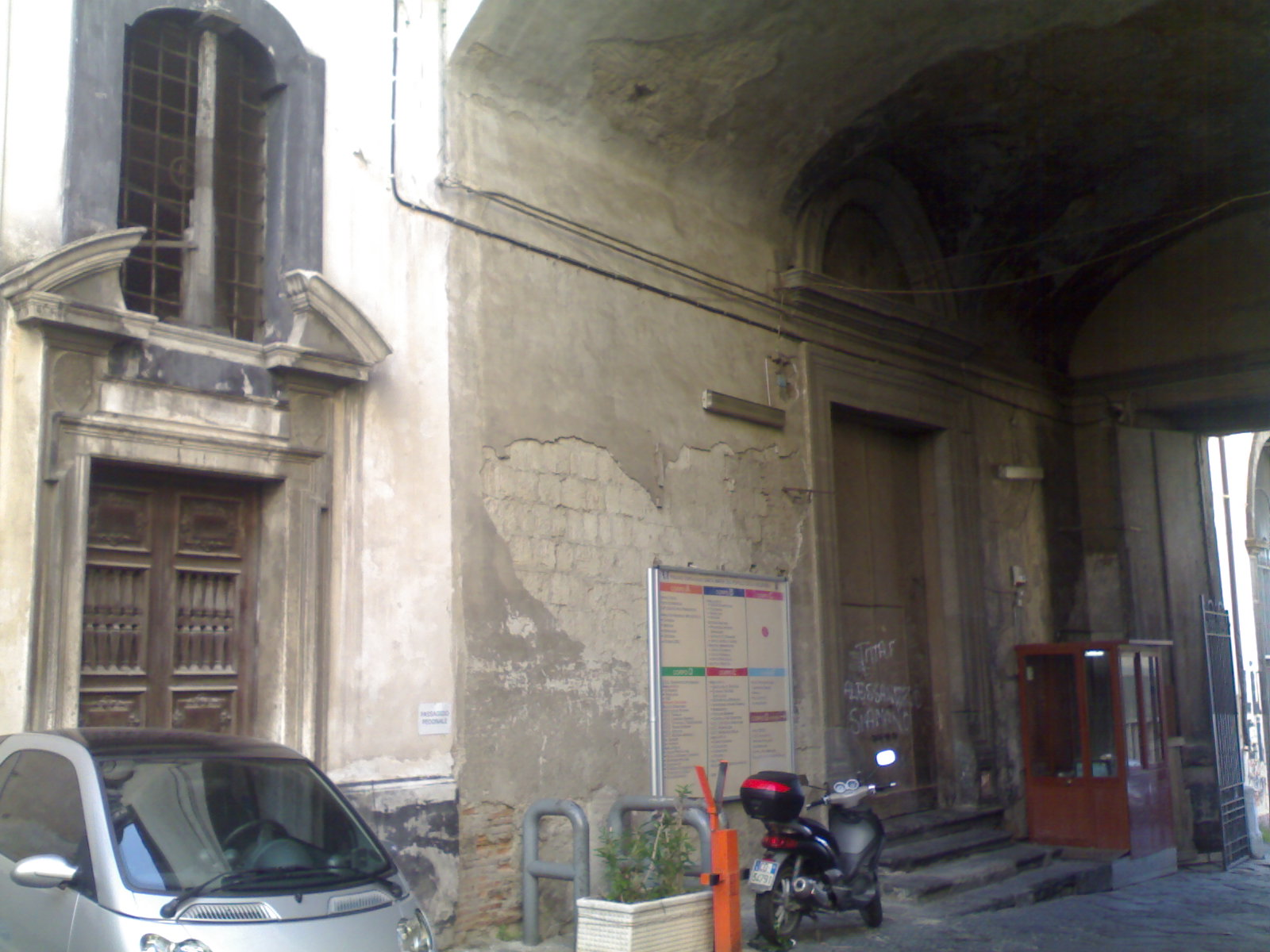 Chiesa di Santa Maria del Popolo agli Incurabili (prospetto esterno)